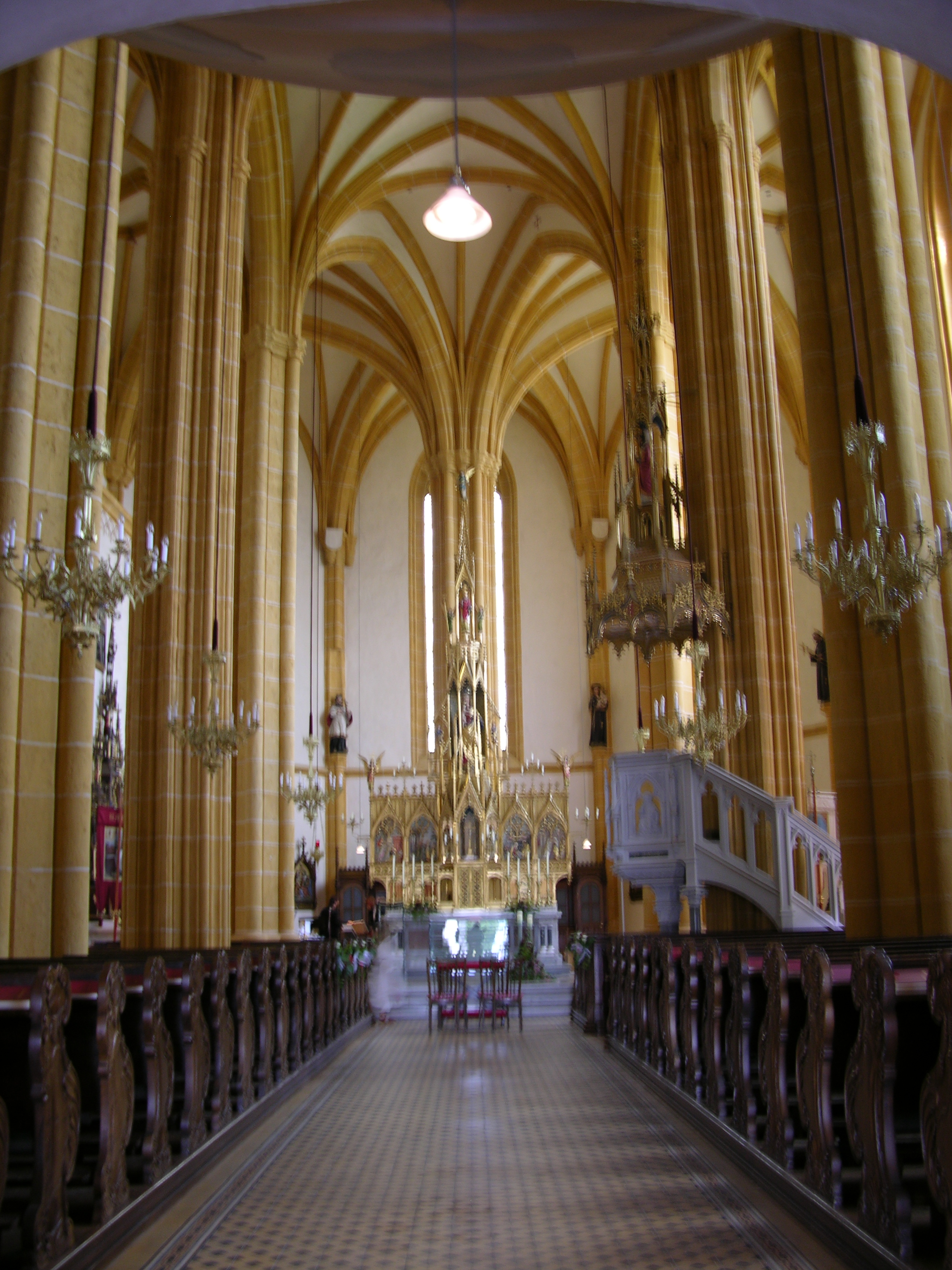 Church in Fernitz (inside 1), Styria, Austria